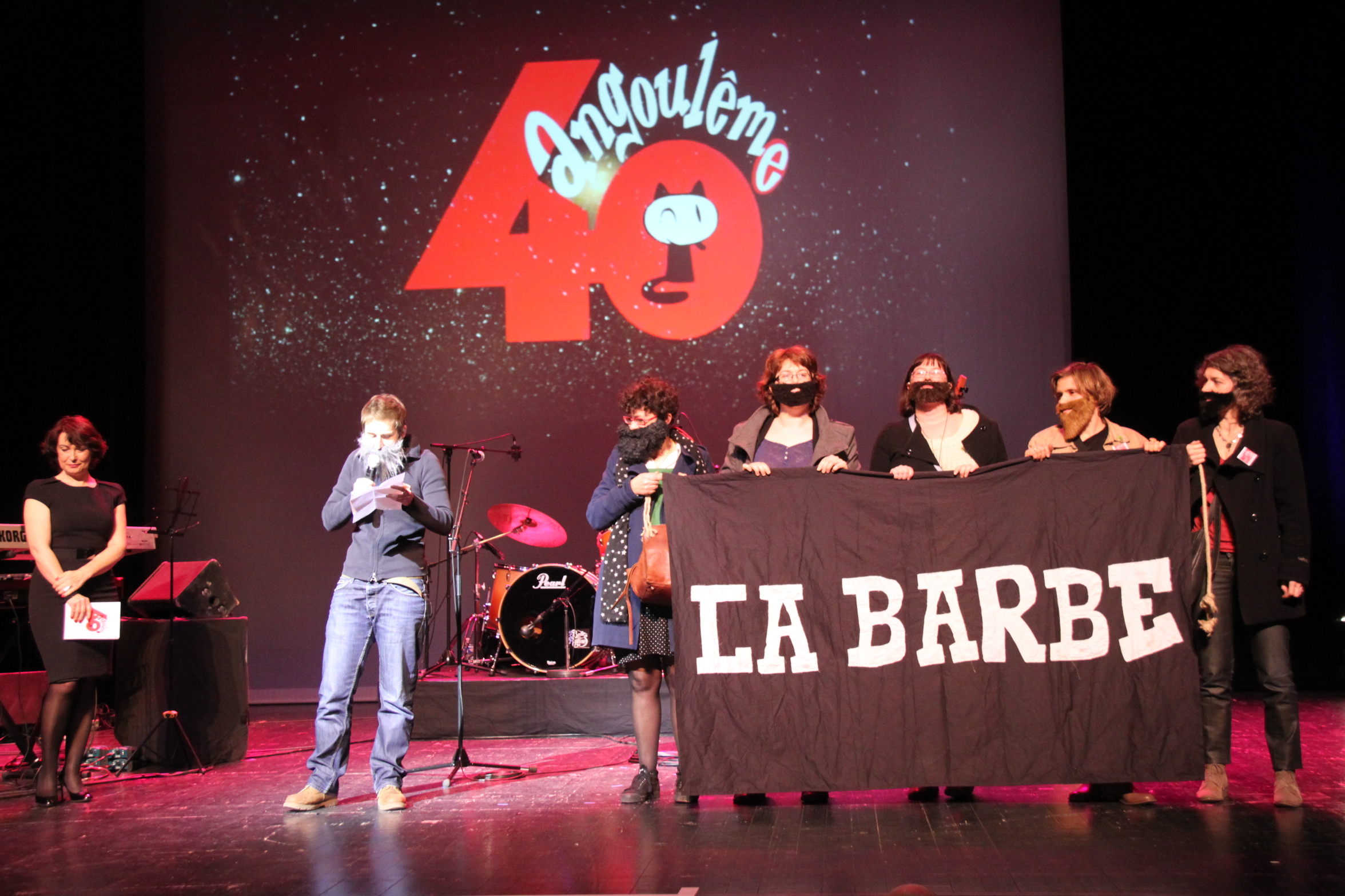 Culture, la mécanique du « calife à la place du calife », une action de la Barbe Aquitaine (groupe d’action féministe) : le festival international de la bande dessinée (FIBD) a depuis sa création attribué son grand prix à 45 auteurs dont 43 hommes : le lauréat préside le jury l’année suivante. Angoulême, 31 janvier 2013.